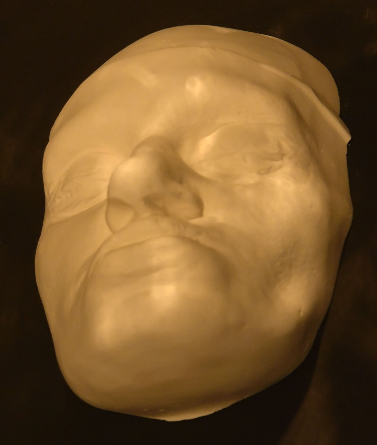 Focke-Museum Bremen: Totenmaske von Gesche Gottfried (1785-1831), Original in Bremen nicht erhalten. Gipsabguss eines weiteren Originalabgusses aus Winchester (GB), Hersteller H&H Sculptors Ltd London 2005.